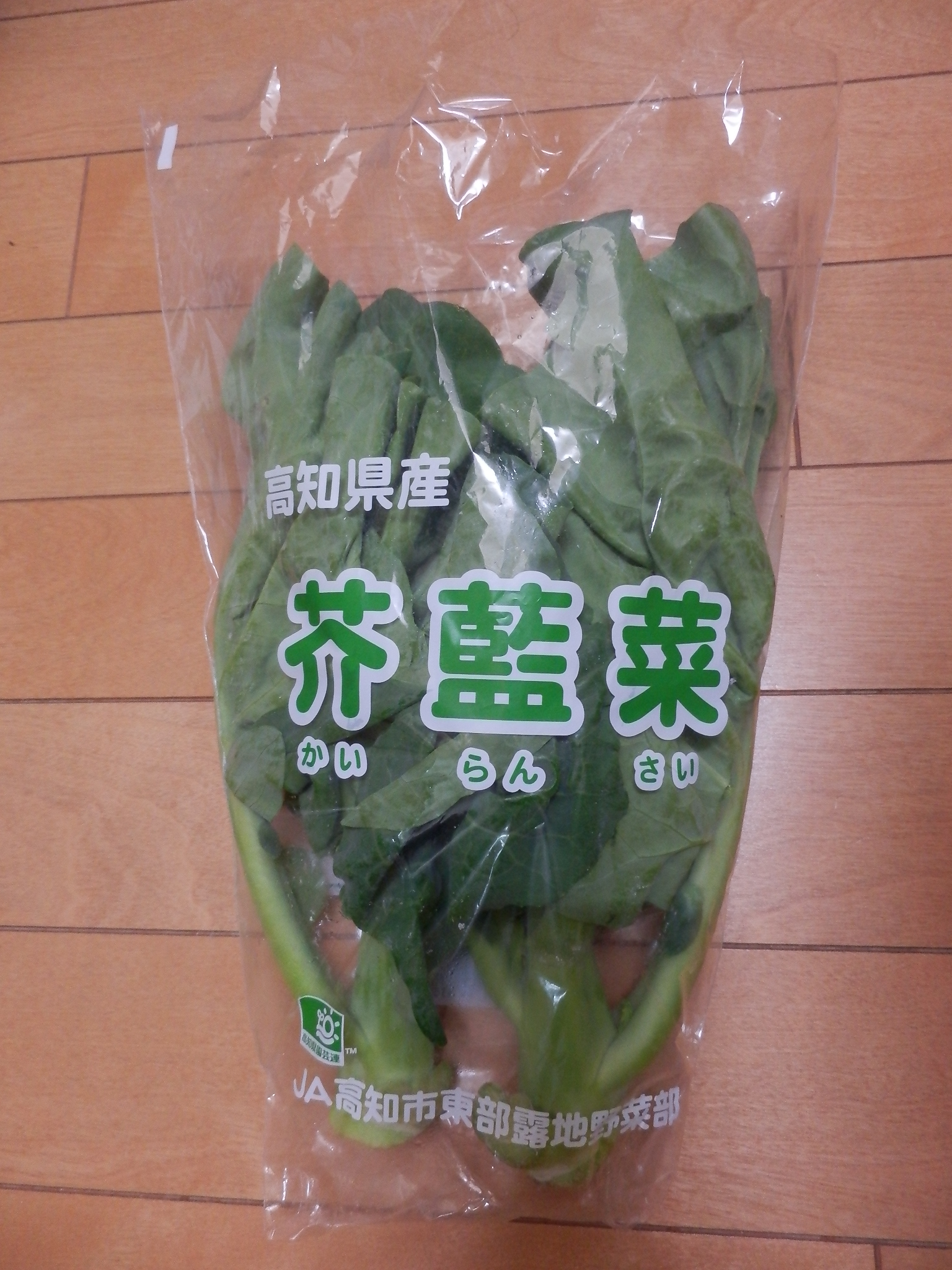 日本で流通するカイラン(高知県産)